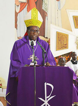 Dans sa cathdérale de Bafia dernière sortie le jour des obsèques de l'Abbé Armel Njama recteur du séminaire saint André de Bafia.